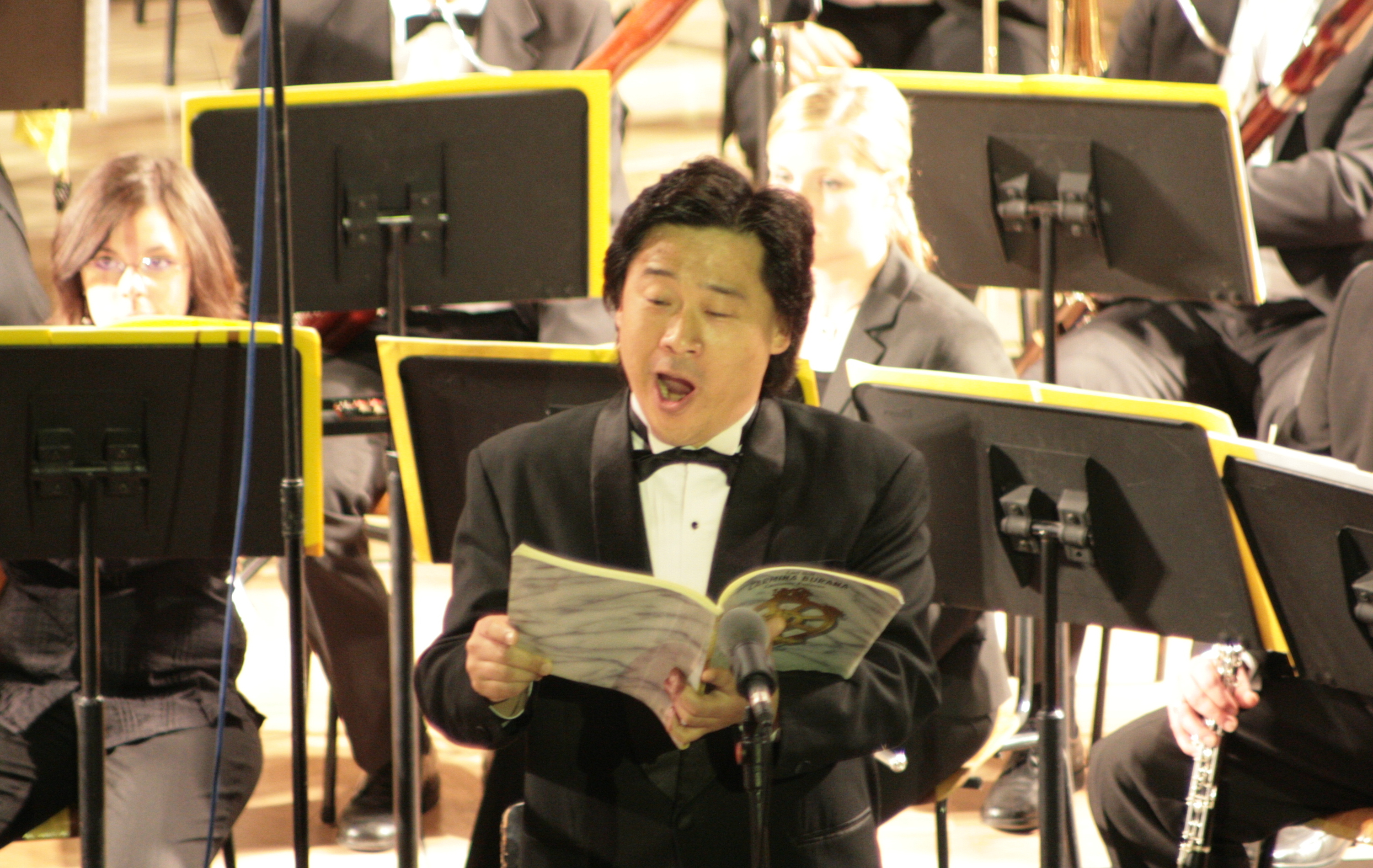 Pauluskirche in Ulm, Germany